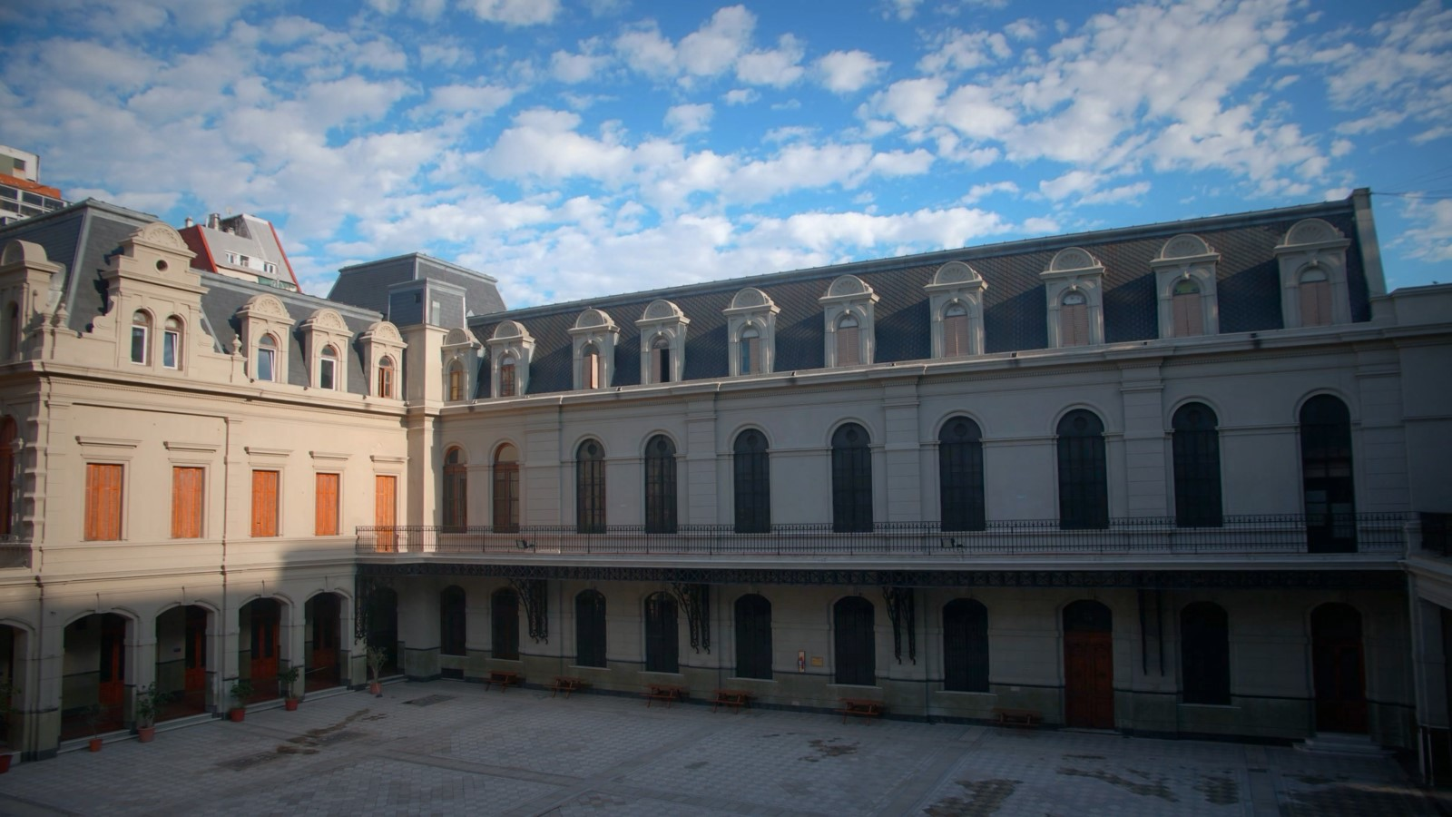 Construcción de estilo francés, diseñada por el Hermano Damián y construida entre 1890 y 1899, en el barrio de Balvanera, Buenos Aires, Argentina. Sede del Colegio La Salle Buenos Aires.